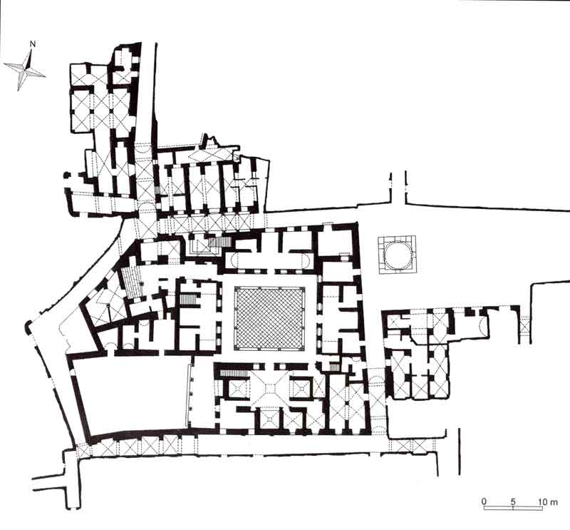 Plan du RdC du palais Dar Hussein Collection personnelle Bertrand Bouret